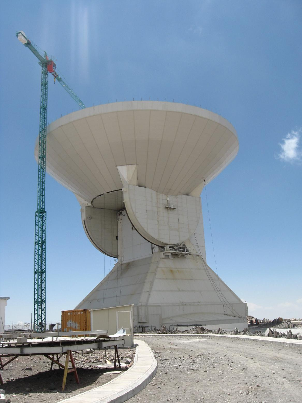 Gran Telescopio Milimetrico